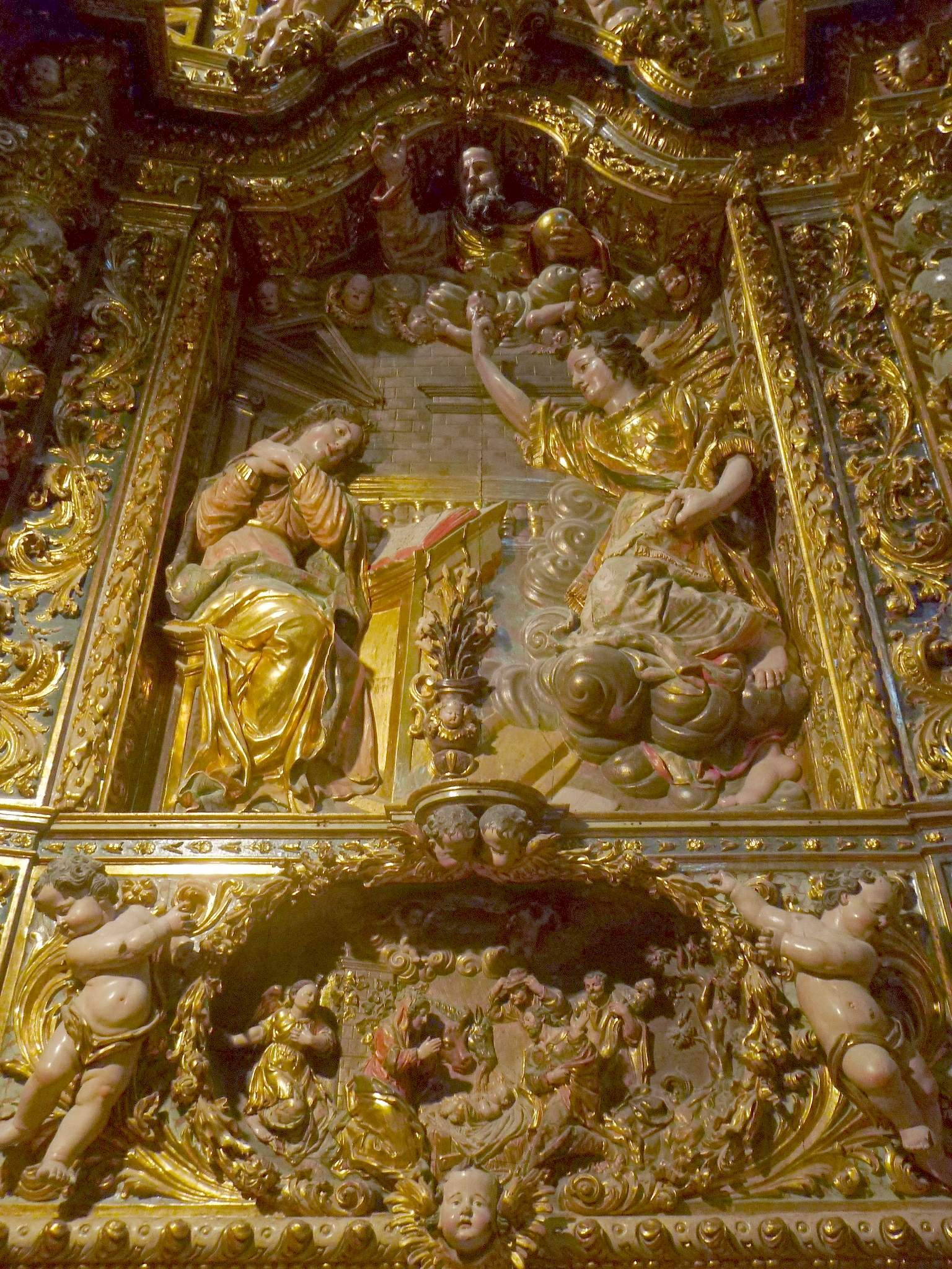 Girona - Catedral, Capilla de l'Anunciació